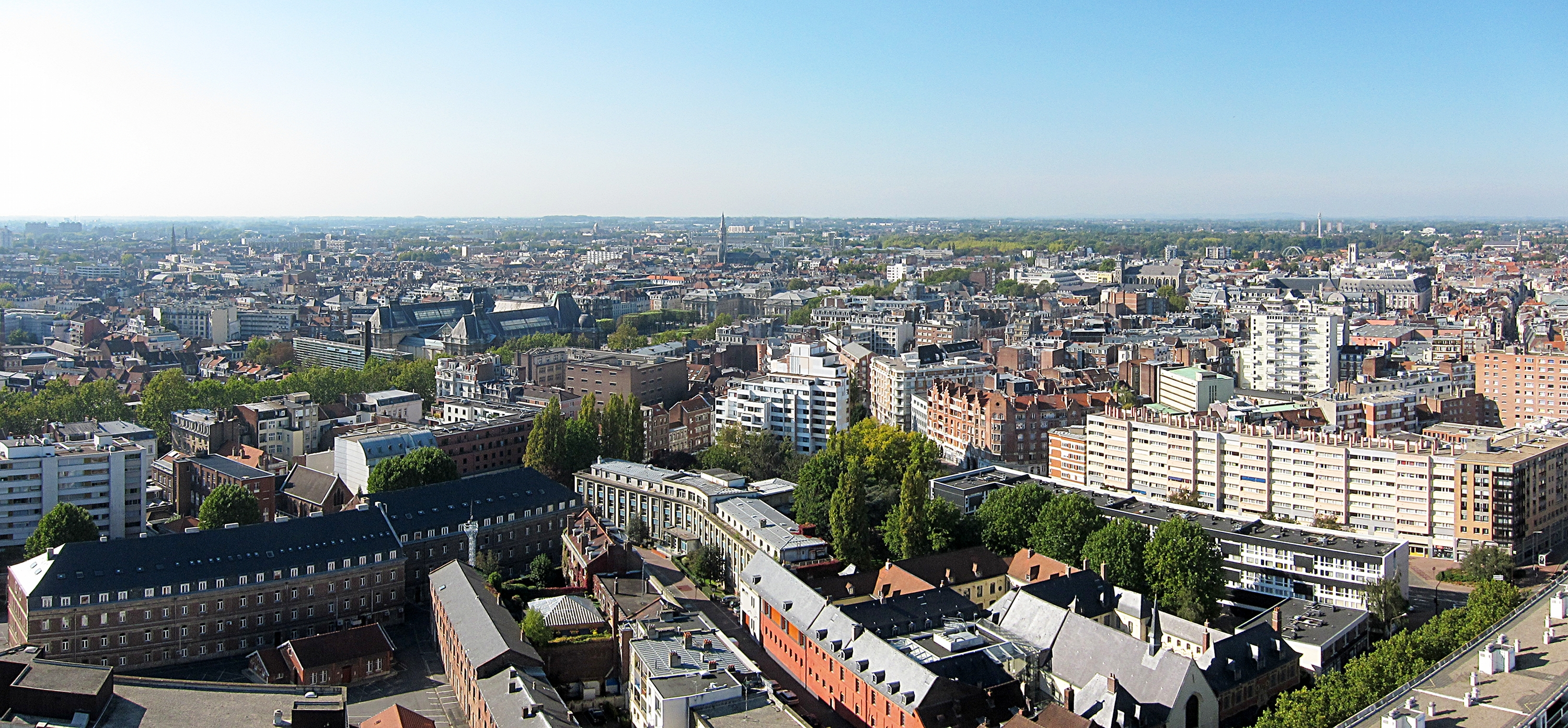 Vue ouest de Lille depuis le beffroi de l'hôtel de ville.